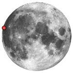 Lage des Eddington Mondkraters, PD, NASA